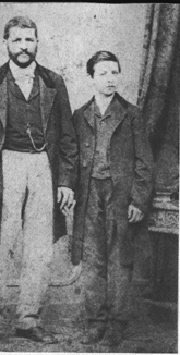 Дончо Стоянов и Никола Войновски